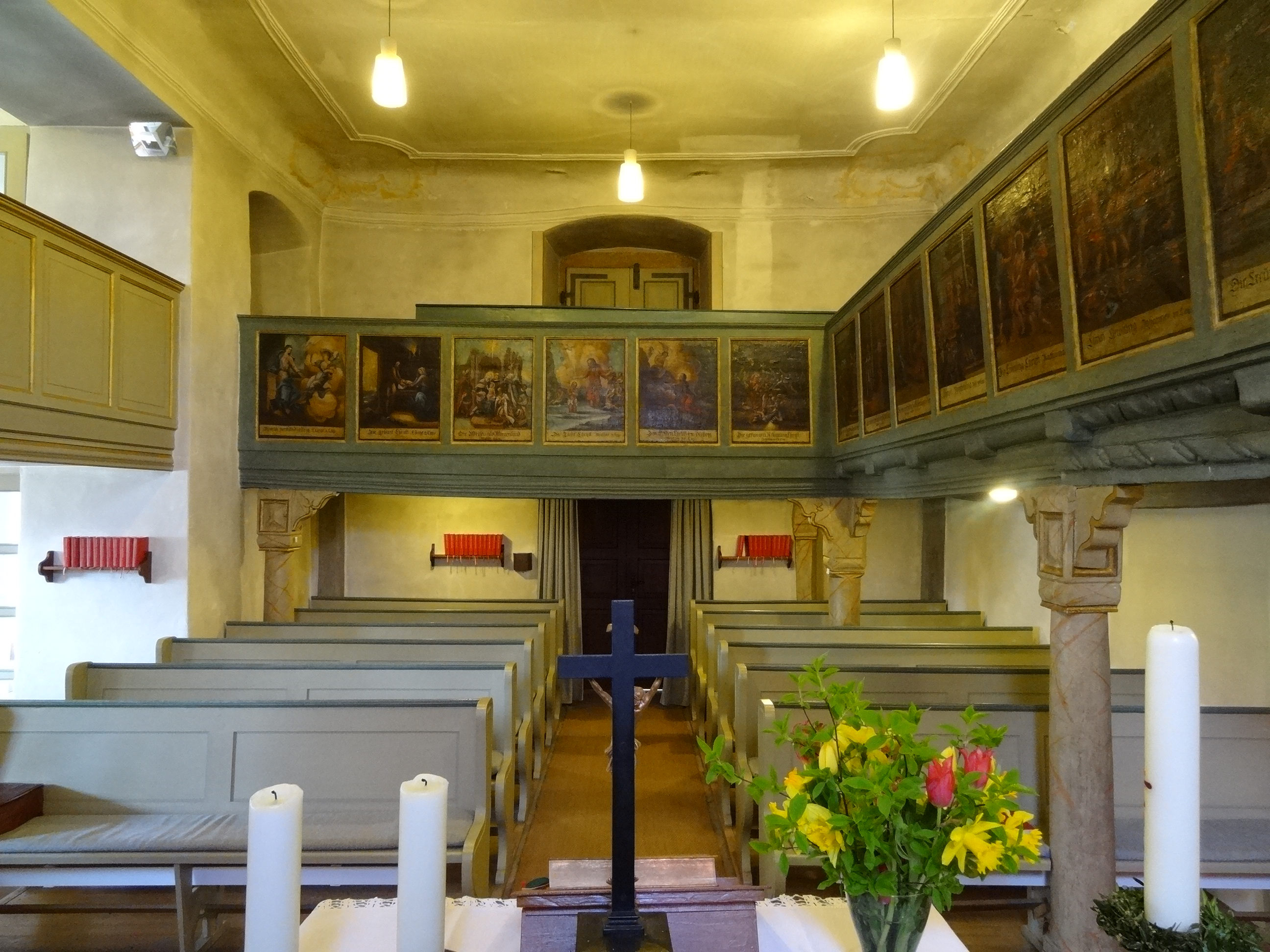 Evangelische Kirche (Oppenrod)